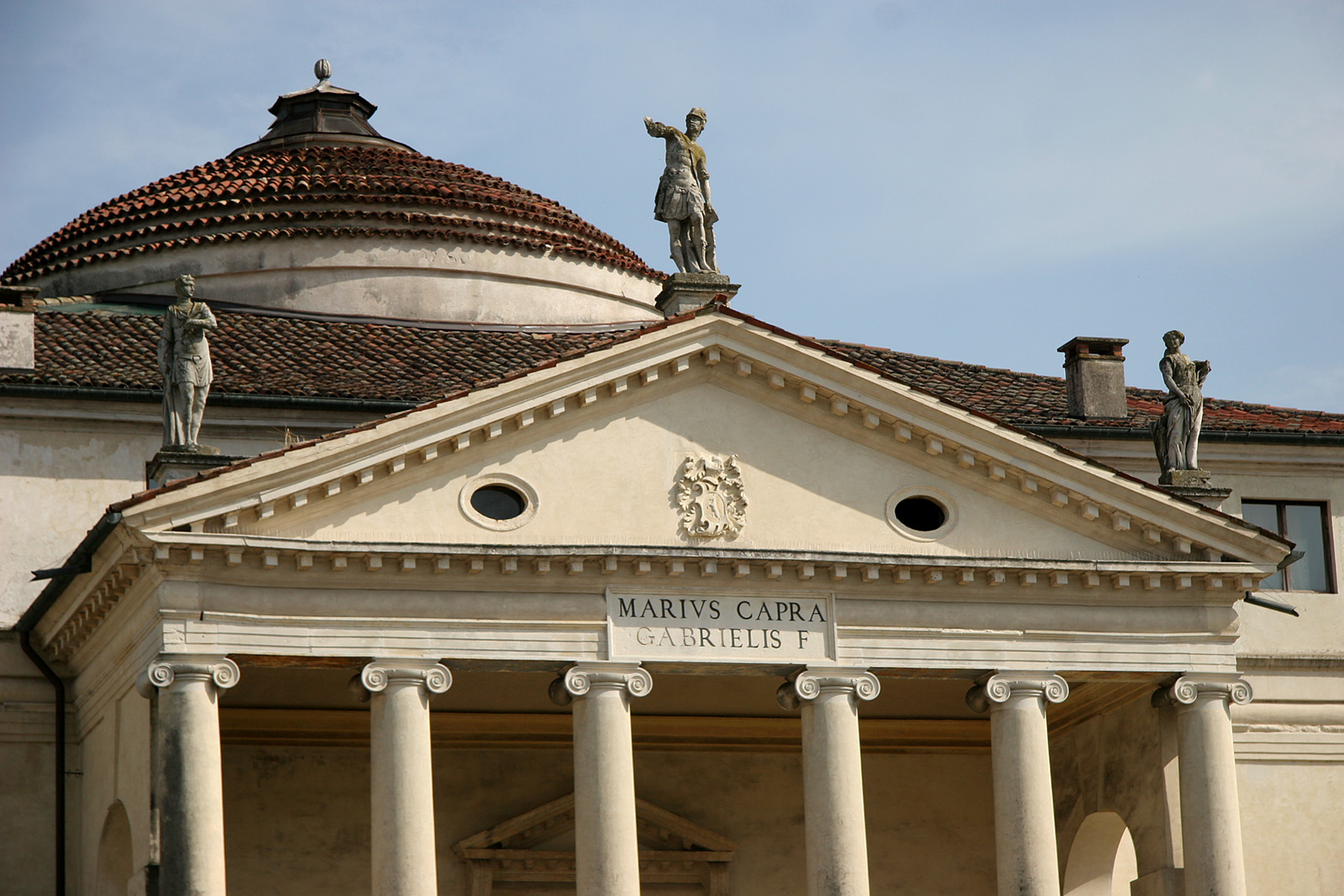 Villa Almerico Capra (La Rotonda), Vicenza, Italia.